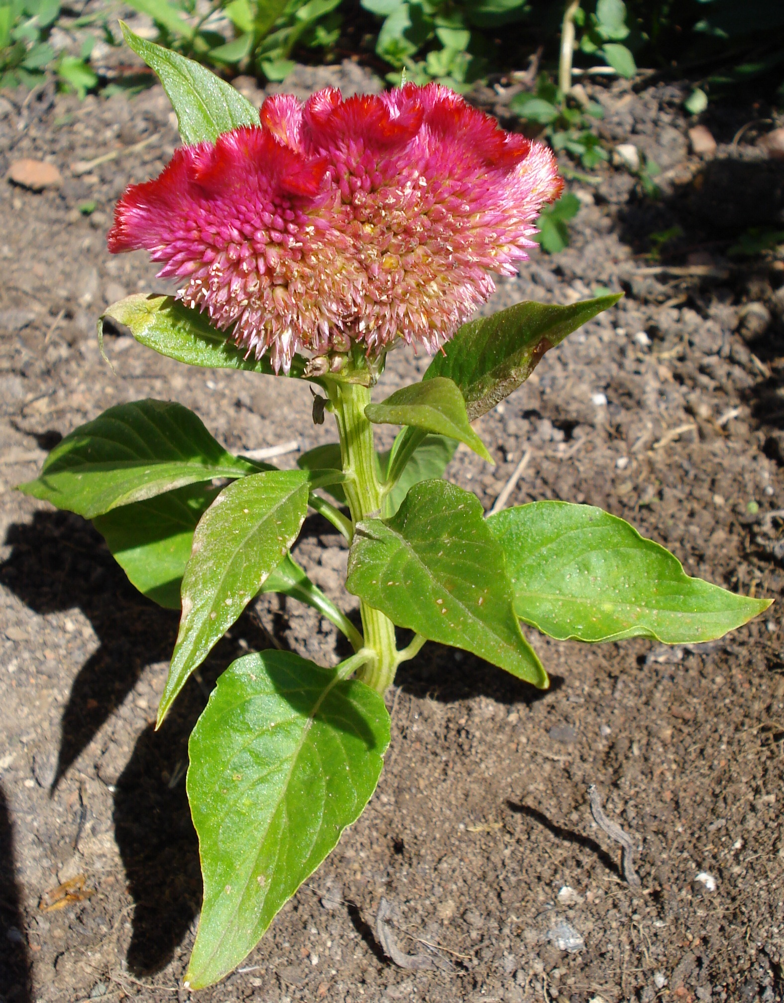 Célosie critata appelée communément amarante crête de coq (couleur: rose-rouge)